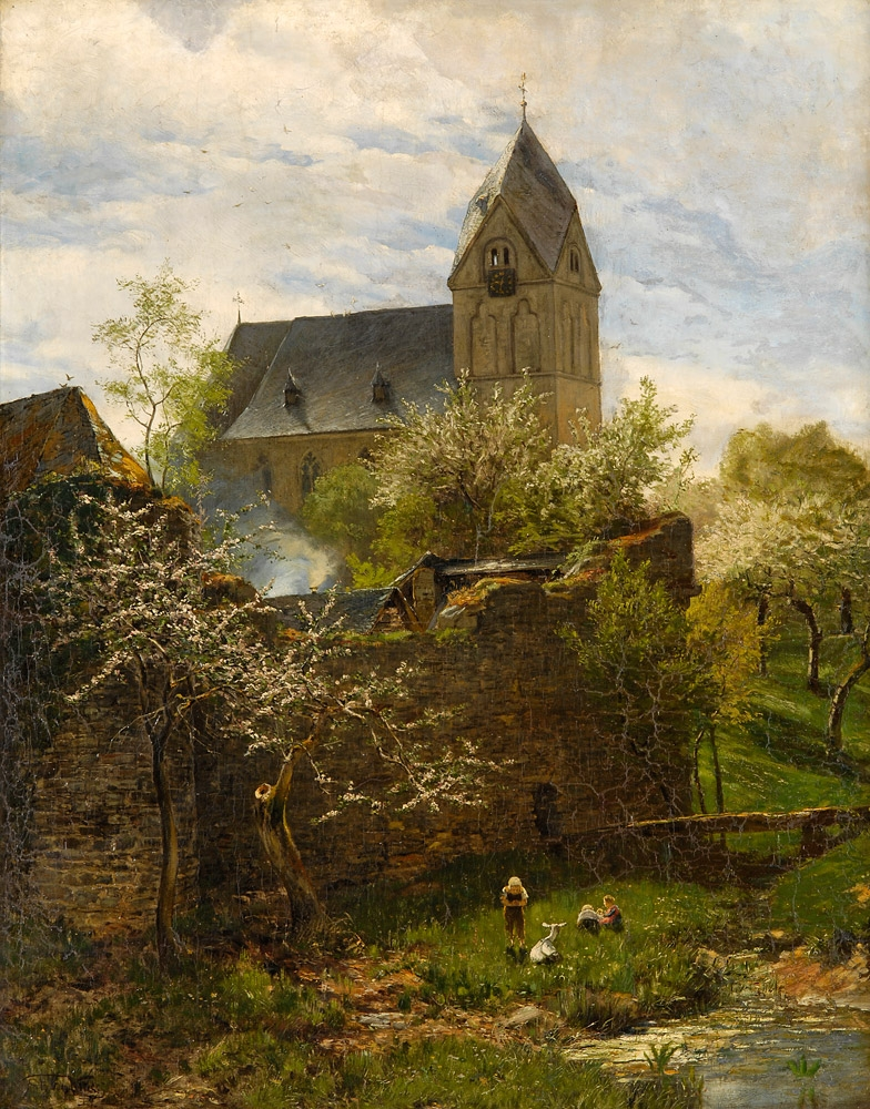 Frühling in der Eifel. Öl auf Leinwand, 108 x 86 cm